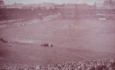 Coupe de France de football 1936-1937 : 1/4 de finale entre Red Star et RC Strasbourg